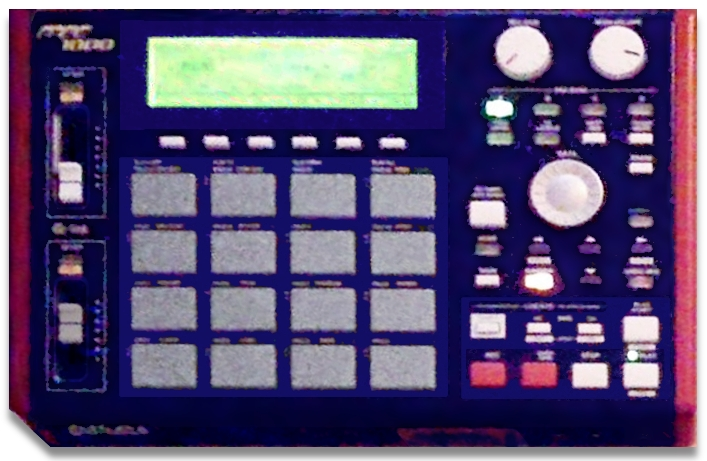 Akai MPC1000